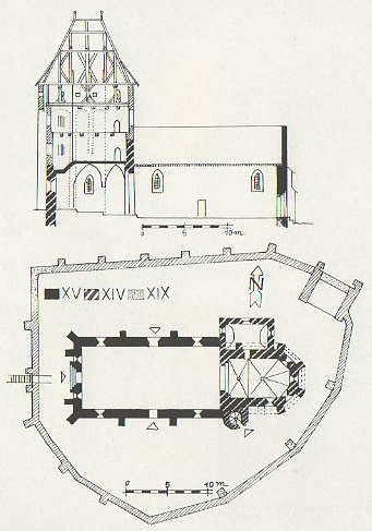 Planul fortificatiei din Buzd.